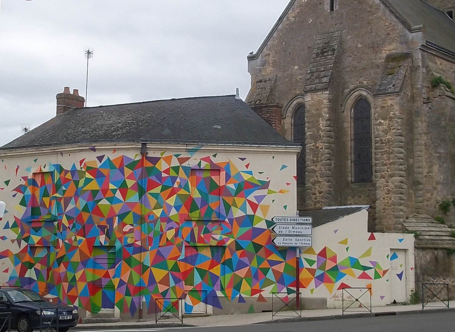 fresque dans le centre bourg